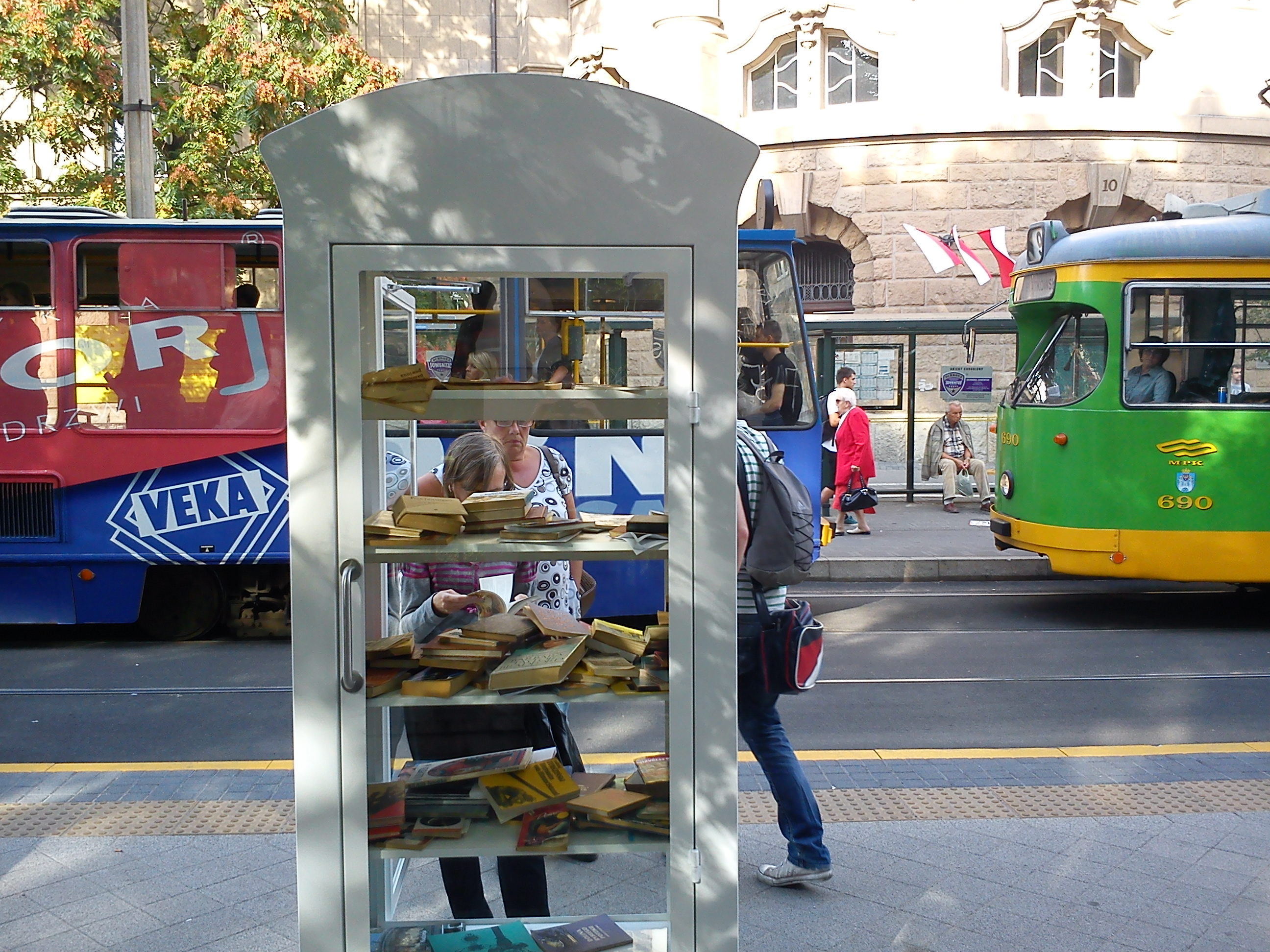 Szafy do bookcrossingu w Poznaniu. Miejski Regał Książkowy.